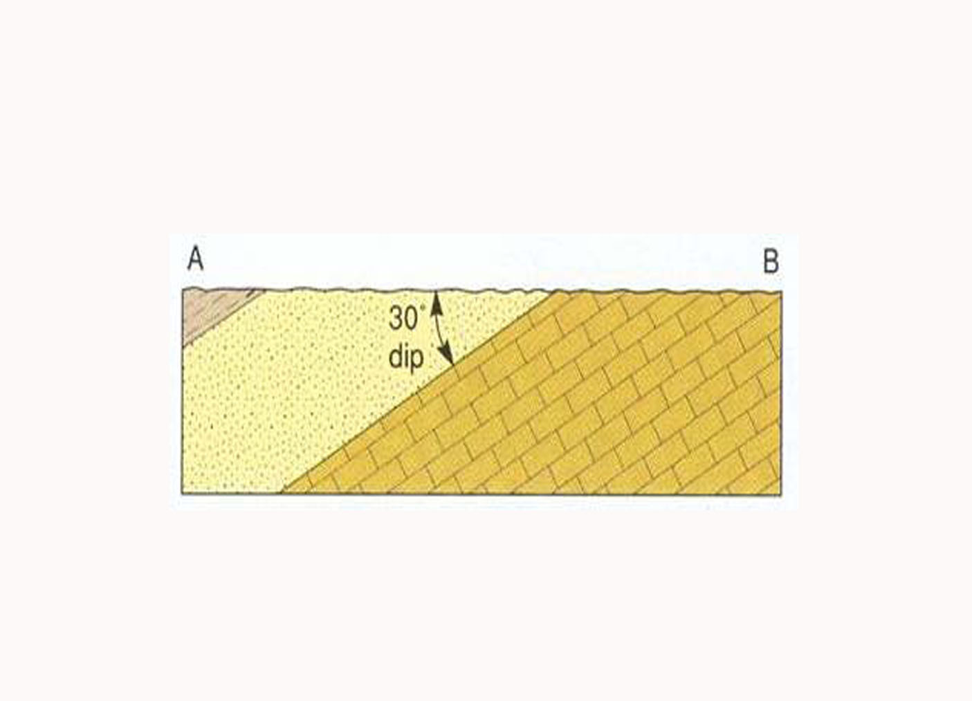 ตัวอย่างภาคตัดขวางทางธรณีวิทยา